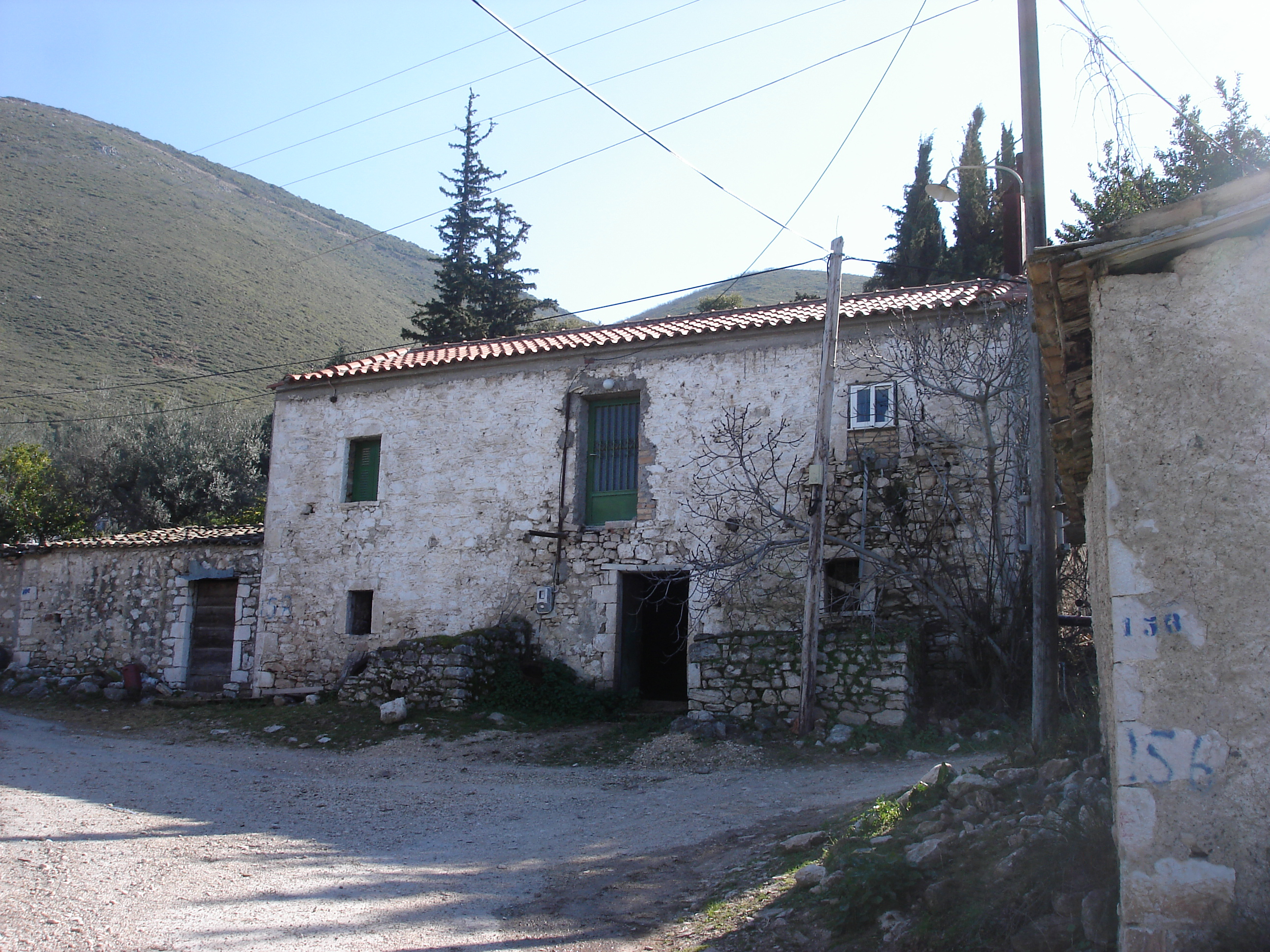 Meksis' inn , 19h century, Krini Village , Achaea, Greece. Χάνι του Μέξα Κρήνη Αχαΐας κτίσμα του χίλια οκτακόσια